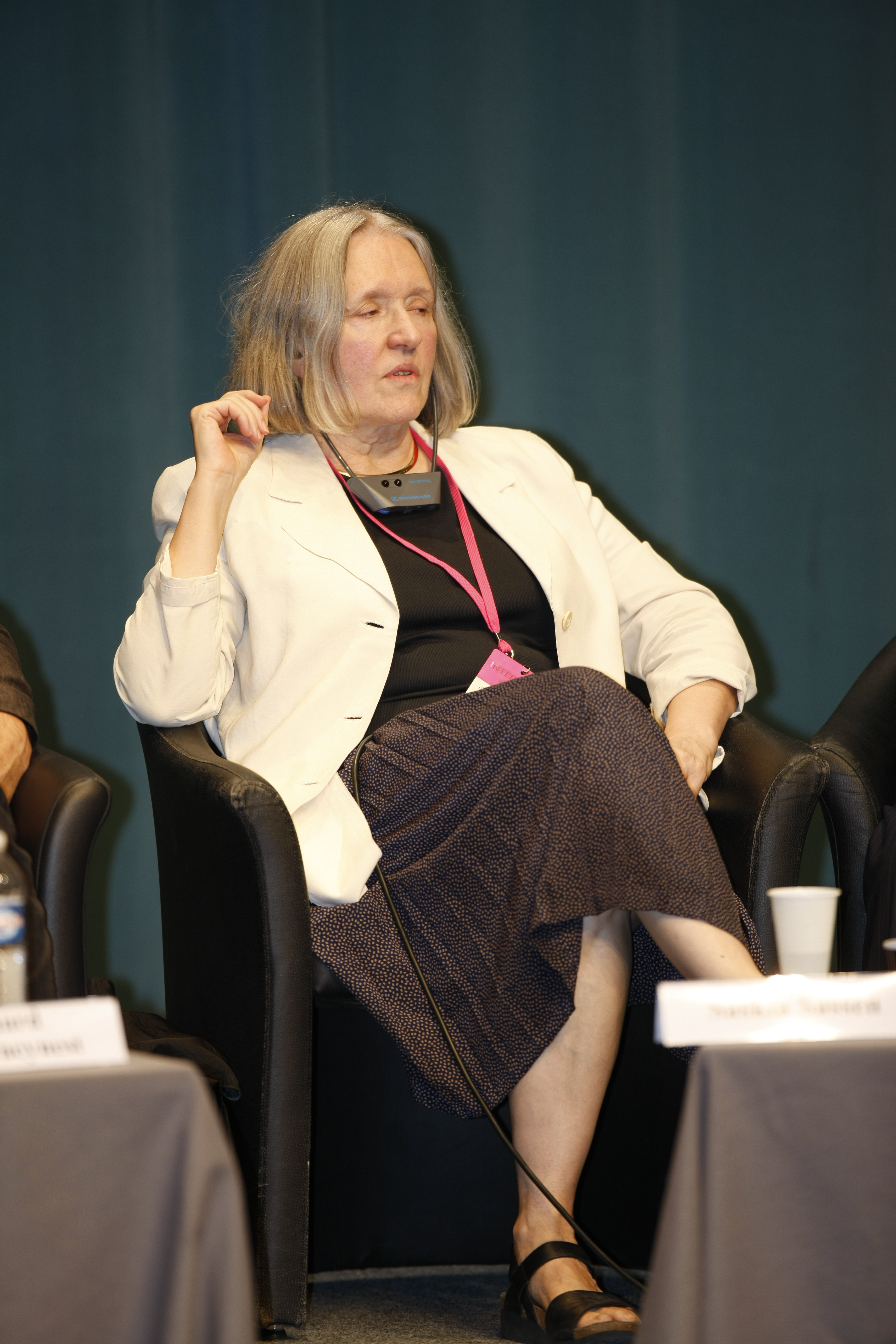 Saskia Sassen